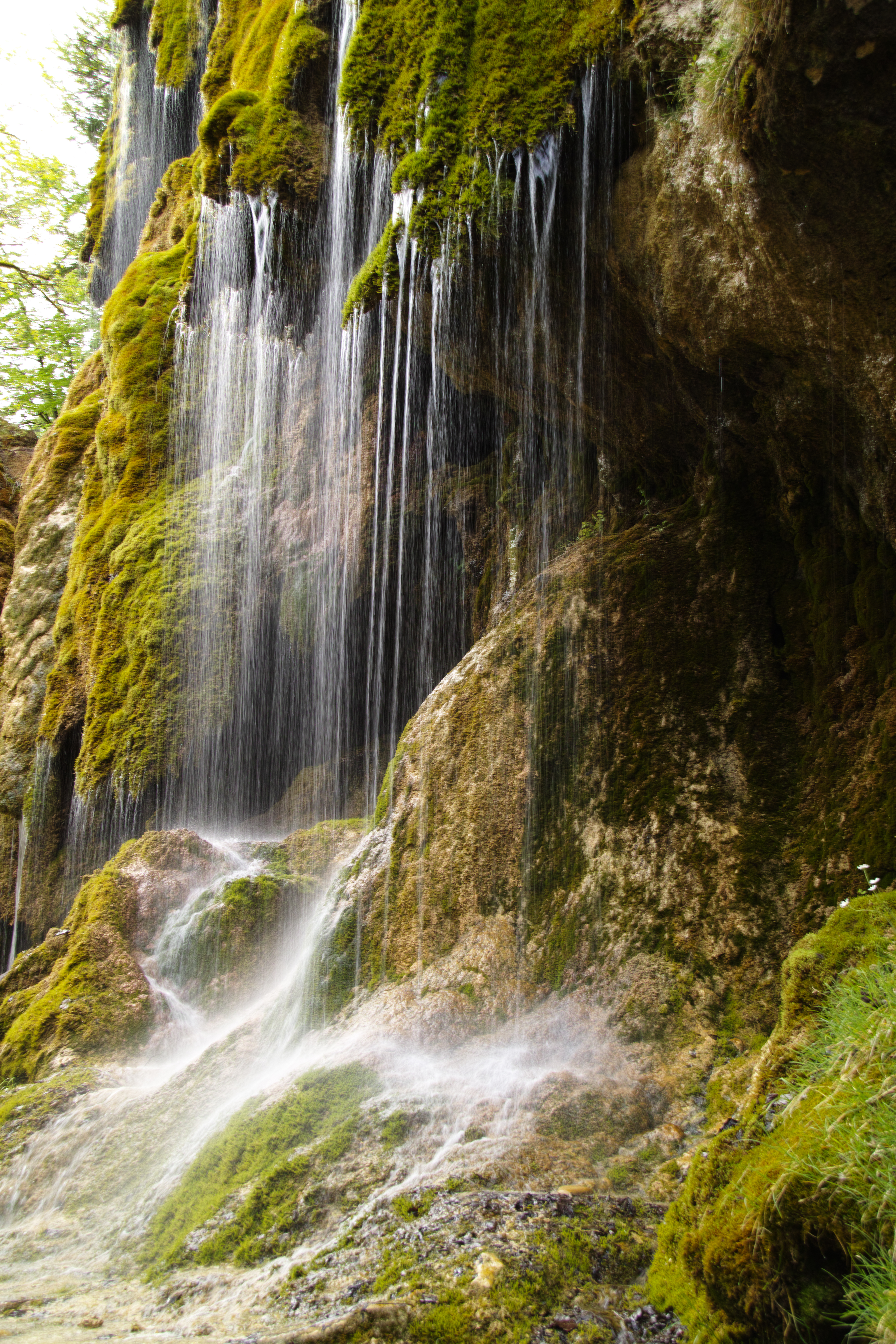 Die Schleierfaelle befinden sich an der Ammer zwischen Saulgrub und Bad Bayersoien im Naturschutzgebiet Ammerleite. Das Wasser fliesst hier (an diversen anderen Stellen als kleine Baeche) ueber den felsigen Untergrund aus dem darueber liegenden Waldgebiet.